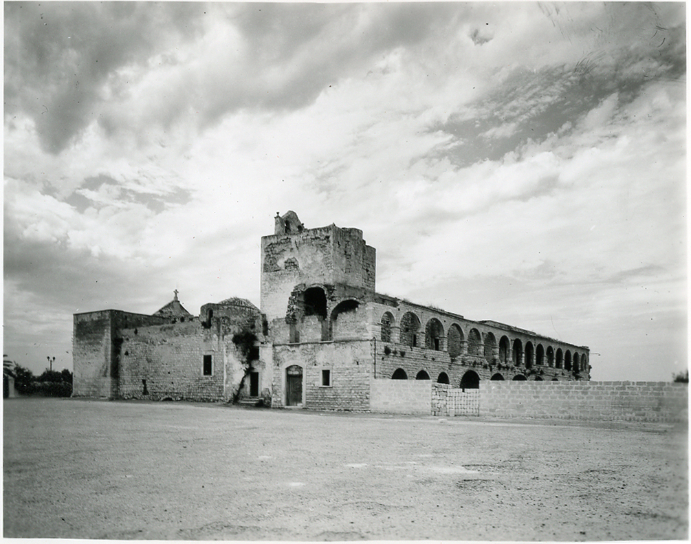 Servizio fotografico : Trani, 1970 / Paolo Monti. - Fototipi: 5 : Positivo b/n, gelatina bromuro d'argento/ carta, provino a contatto da pellicola 10x12. - ((Serie costituita da 5 provini a contatto identificati con i nn.: : 11159, 11281, 11370, 11373, 11427. La suddetta serie è contenuta nella scatola identificata con il n. 176; sul coperchio iscrizione manoscritta a pennarello: "Provini.". - Fonte: Rubrica di Paolo Monti: Monti/ 2/ 6 giugno 1964 - 31 marzo 1966/ 8194-12420 (1964-1966), presso Archivio Paolo Monti